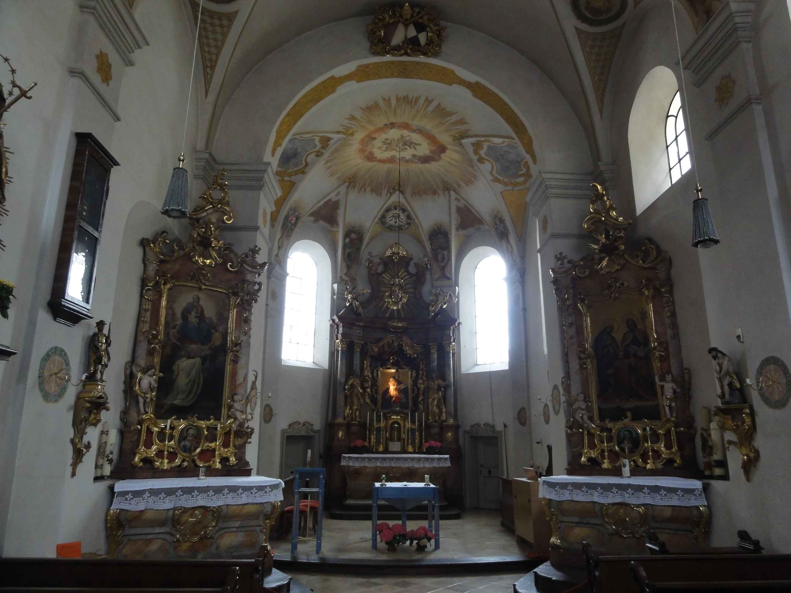 Murnau am Staffelsee, Germany